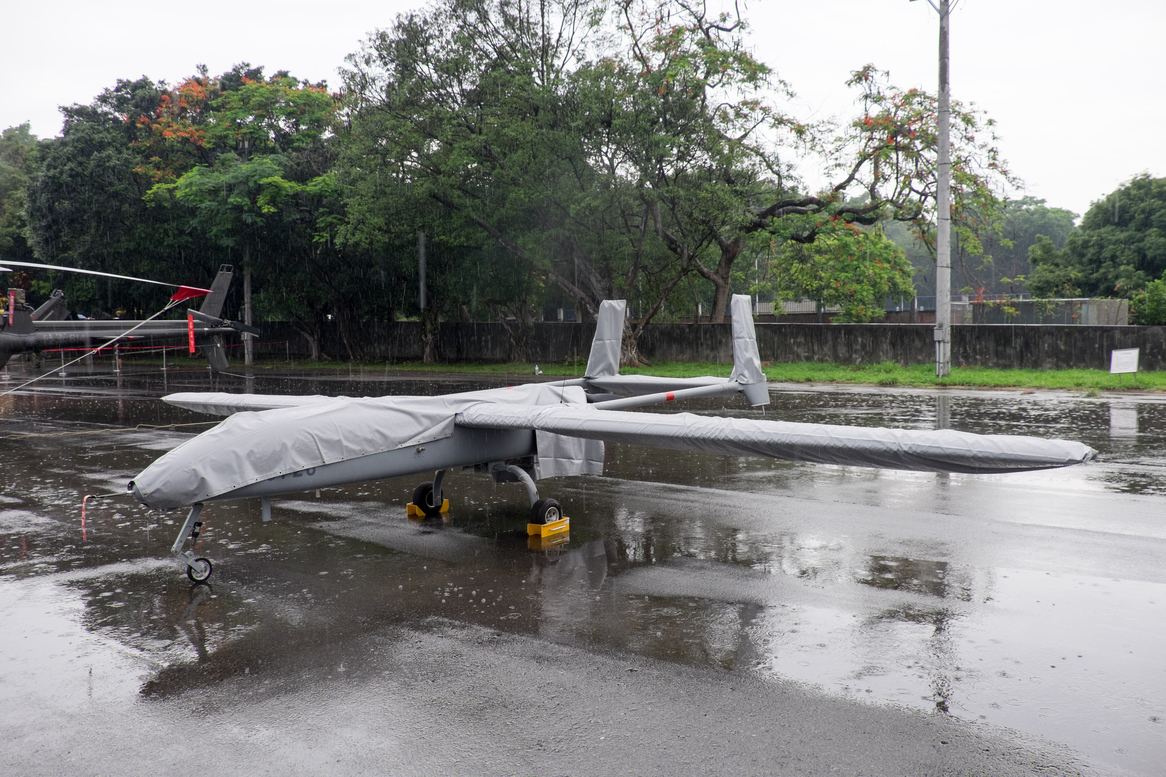 2015年成功嶺營區開放活動，上方與垂直尾翼蓋上防雨罩的銳鳶無人機9728。